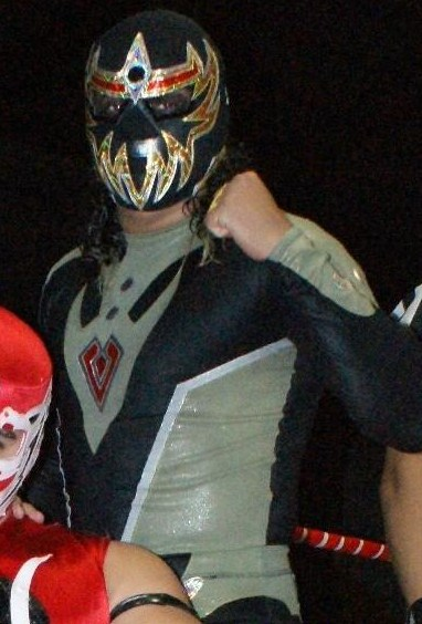 Máscara Dorada, luchador del CMLL, luchando en la Arena Coliseo de Monterrey en diciembre de 2010.